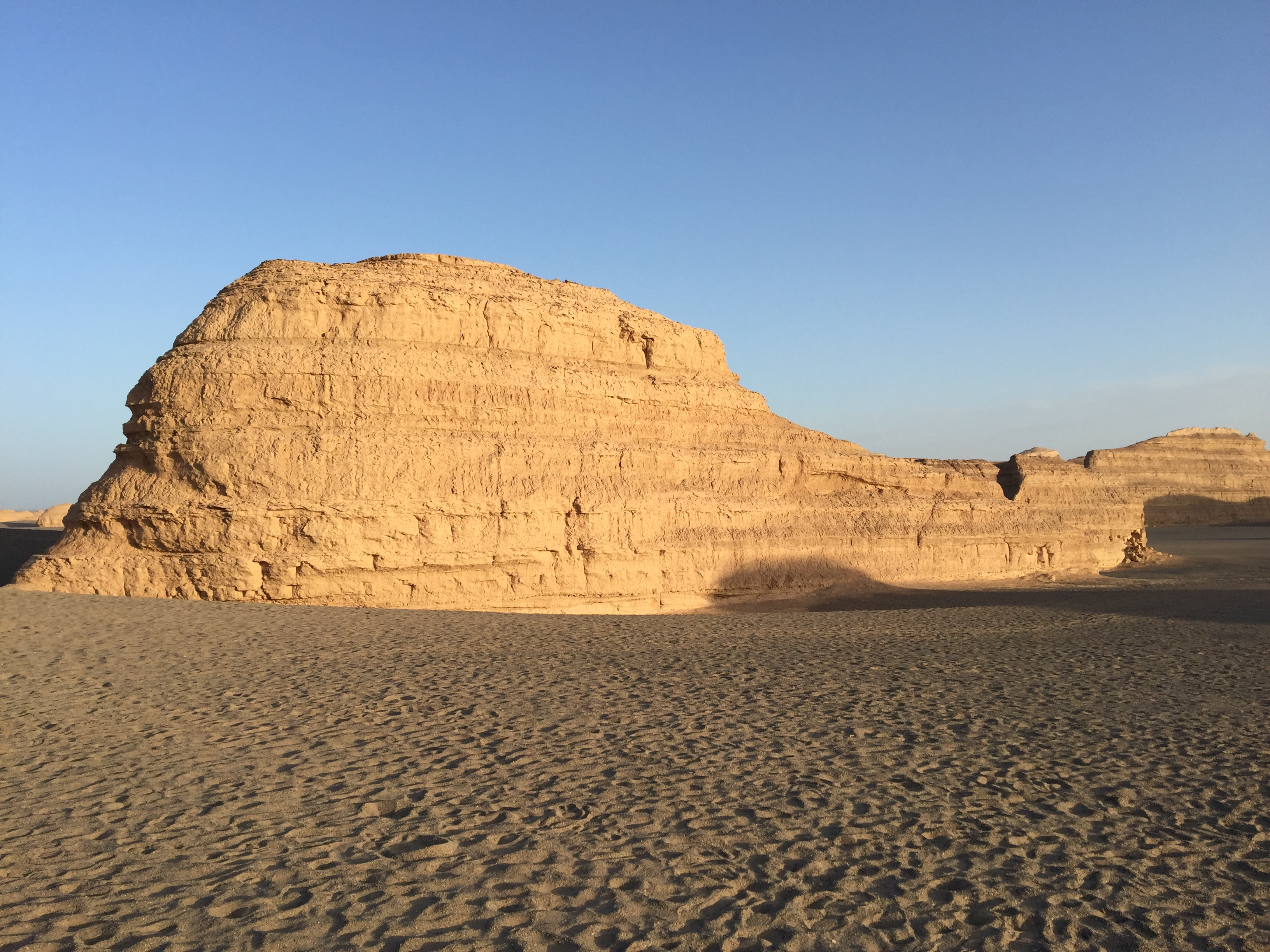 敦煌雅丹国家地质公园内的雅丹地貌